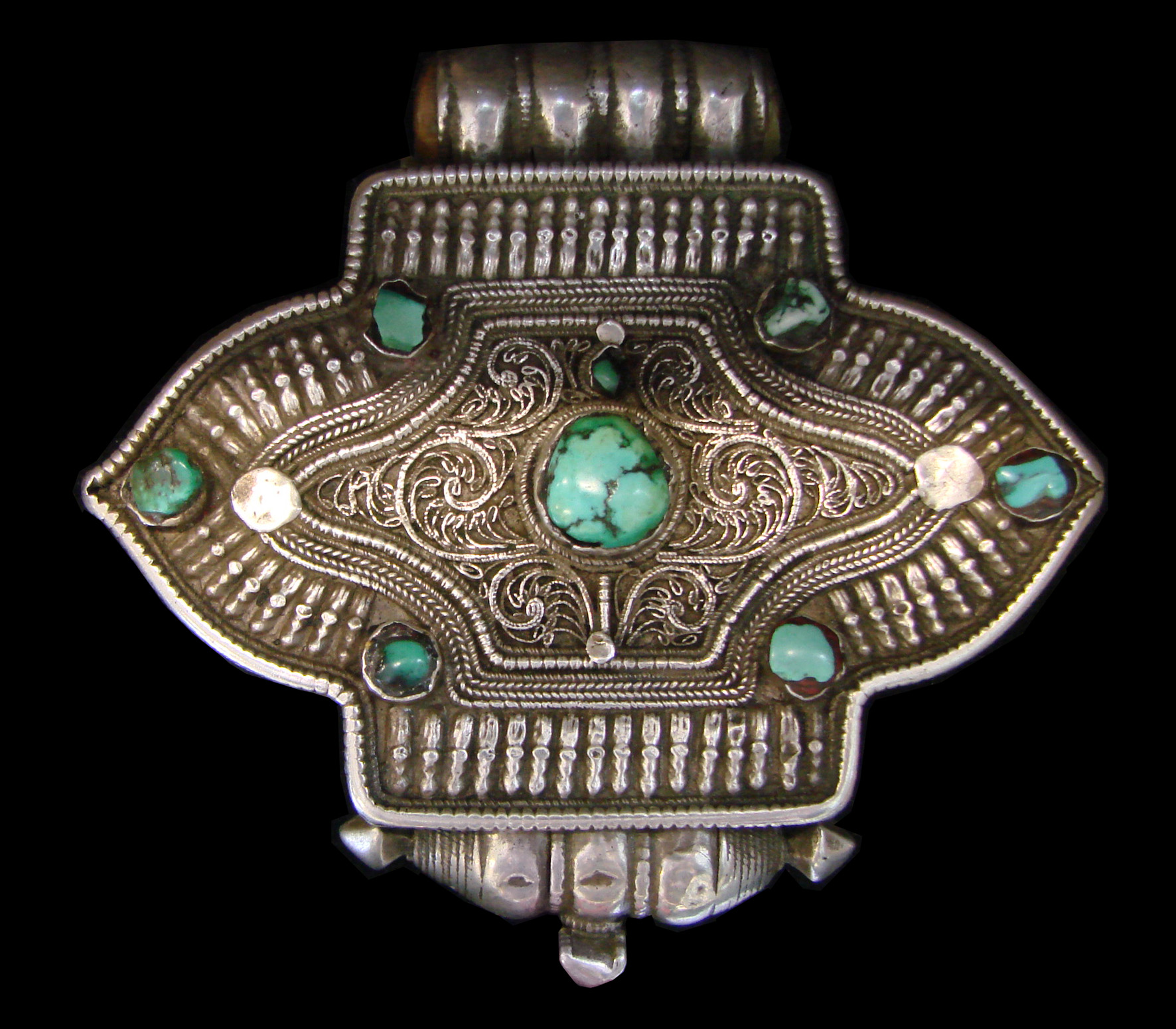 Gau:pendant,reliquary for amulets,silver,filigreed silver and turquoises,Tibet.